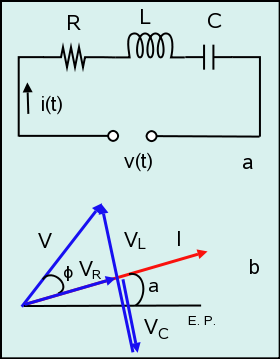 Circuito serie RLC (RLC serial circuit)